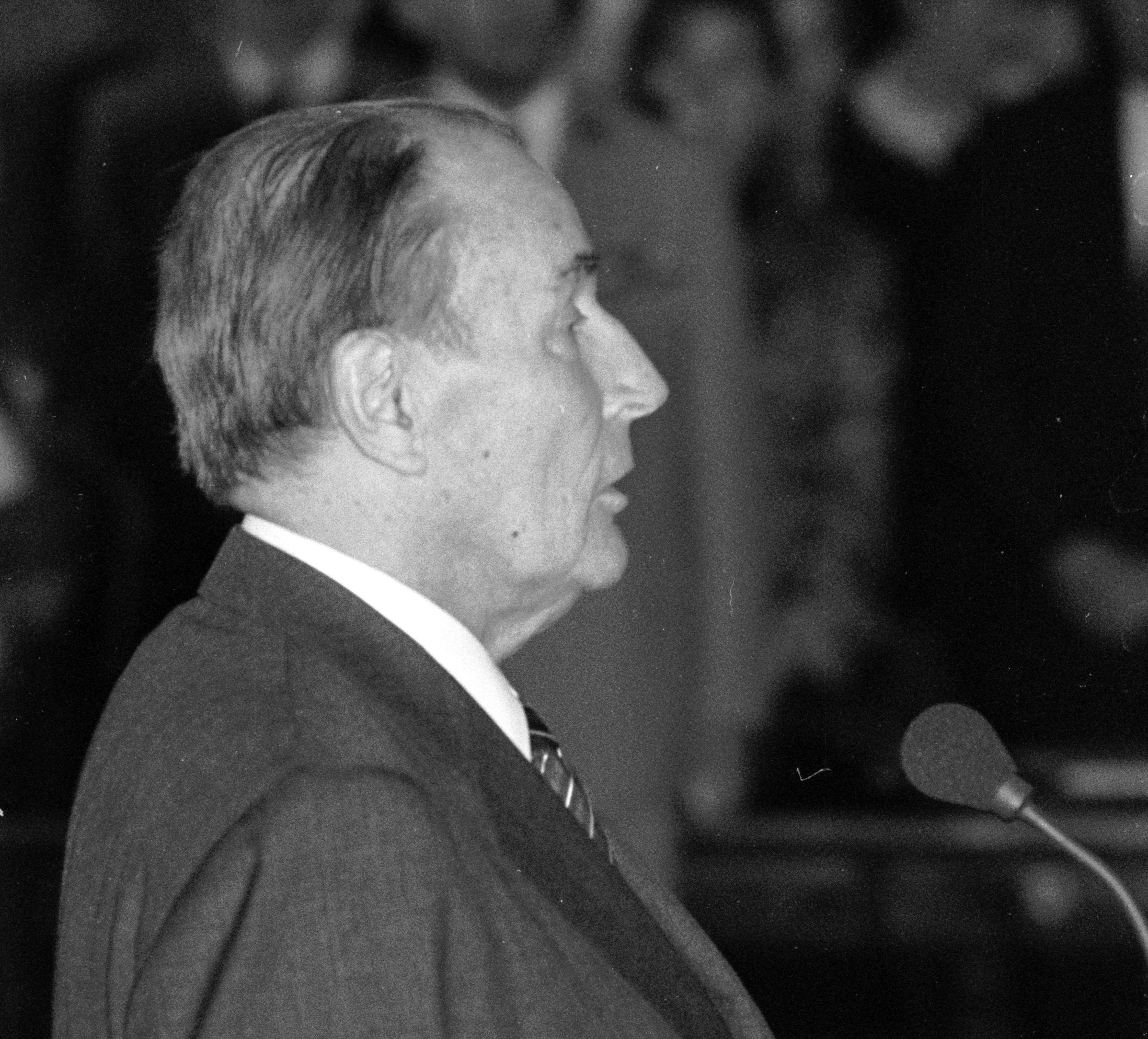 François Mitterrand, président de la République française, à l'Élysée, Paris (France) le 28 novembre 1991.